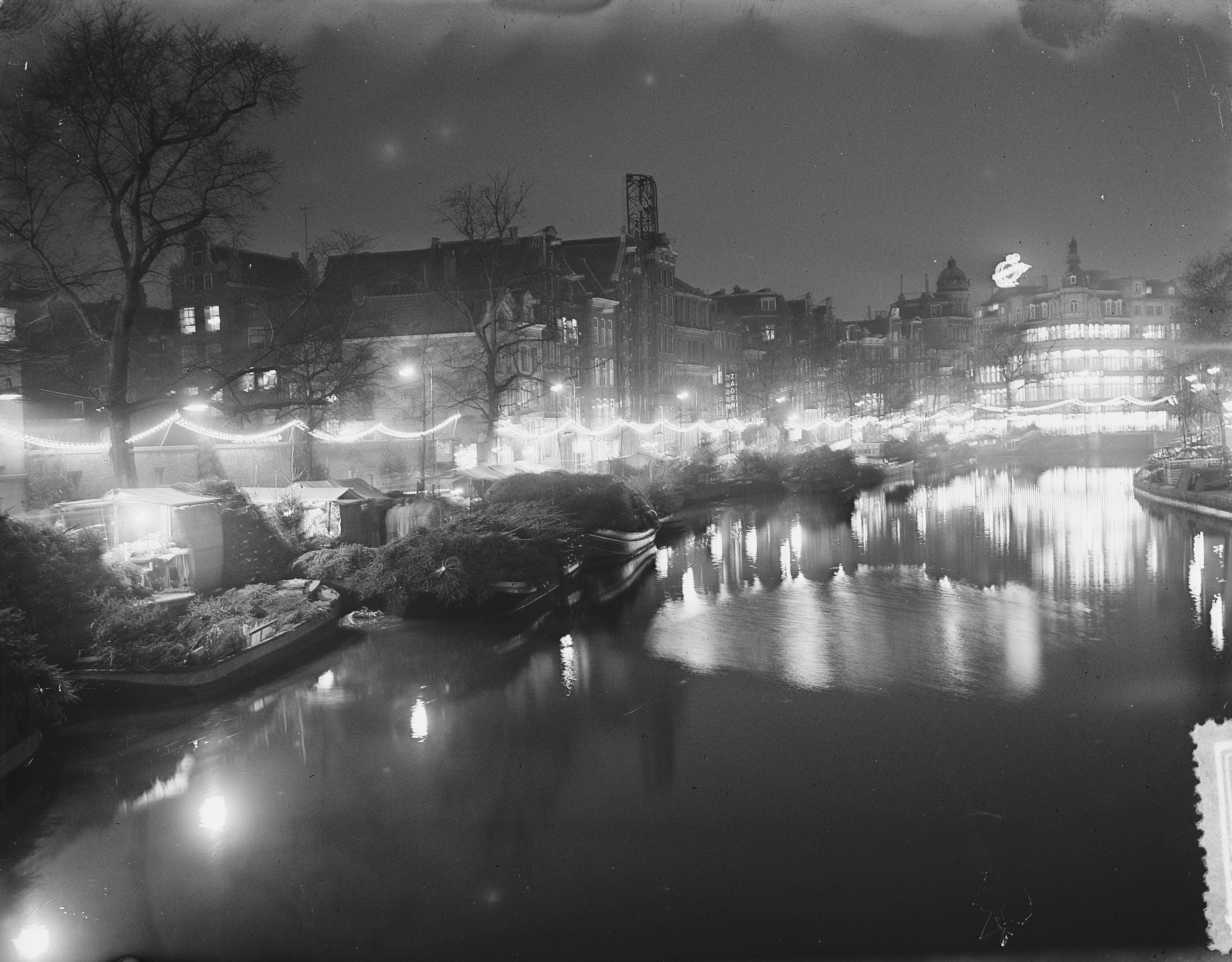 Collectie / Archief : Fotocollectie Anefo Reportage / Serie : [ onbekend ] Beschrijving : Kerstverlichting Bloemenmarkt Amsterdam Datum : 12 december 1953 Locatie : Amsterdam, Noord-Holland Trefwoorden : Kerstverlichting, bloemenmarkt Fotograaf : Behrens, Herbert / Anefo Auteursrechthebbende : Nationaal Archief Materiaalsoort : Glasnegatief Nummer archiefinventaris : bekijk toegang 2.24.01.09 Bestanddeelnummer : 906-1715